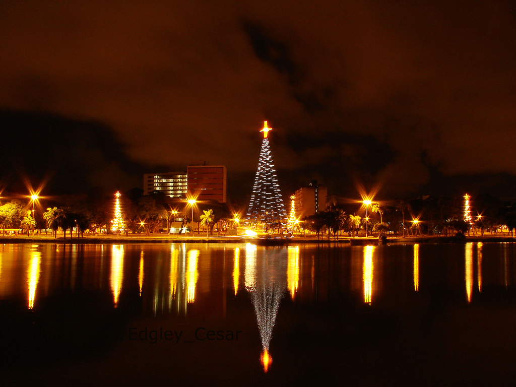 Foto da lagoa do Parque Solon de Lucena, em João Pessoa, PB - Brasil